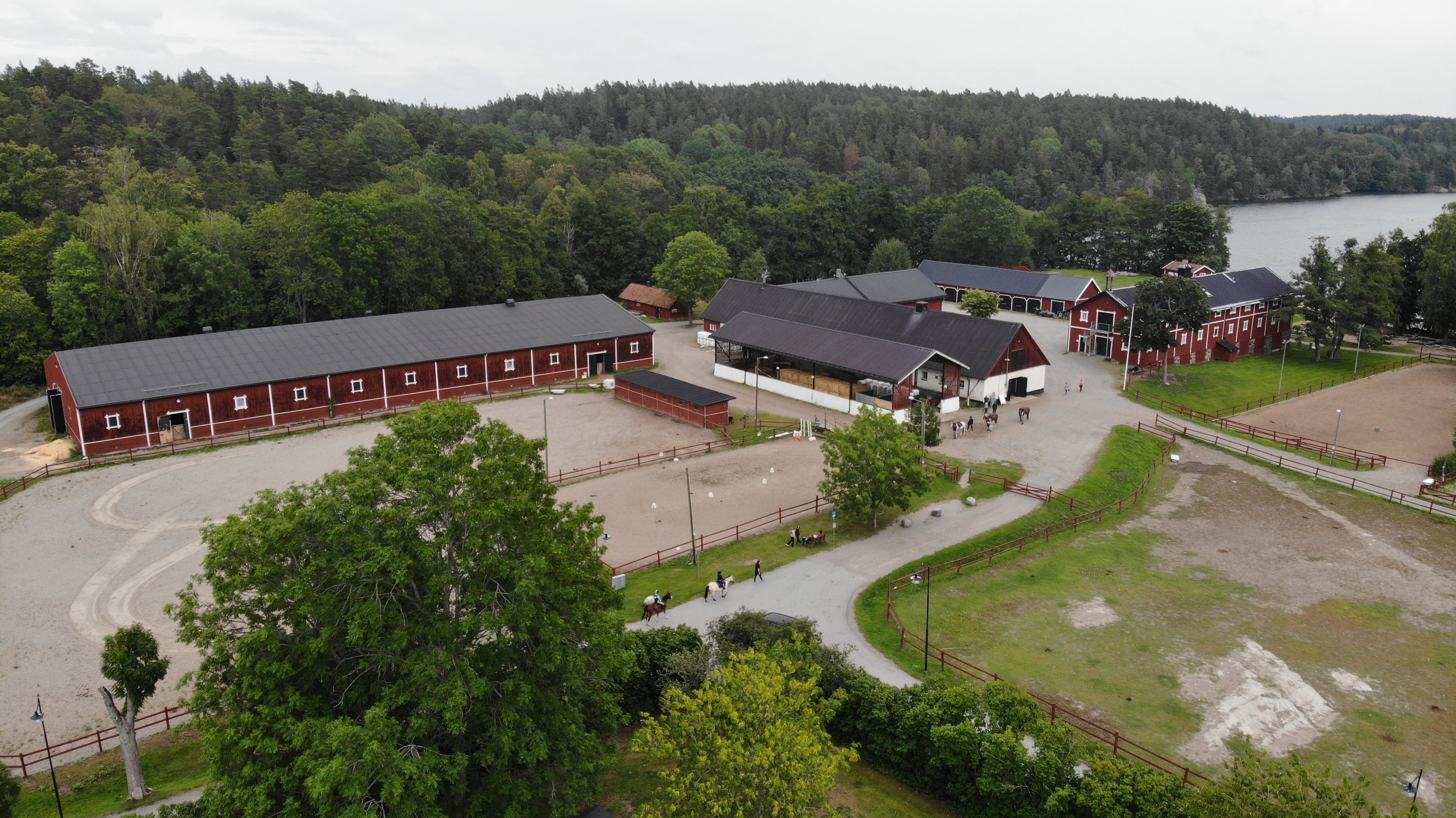 Bild av huvudbyggnader.